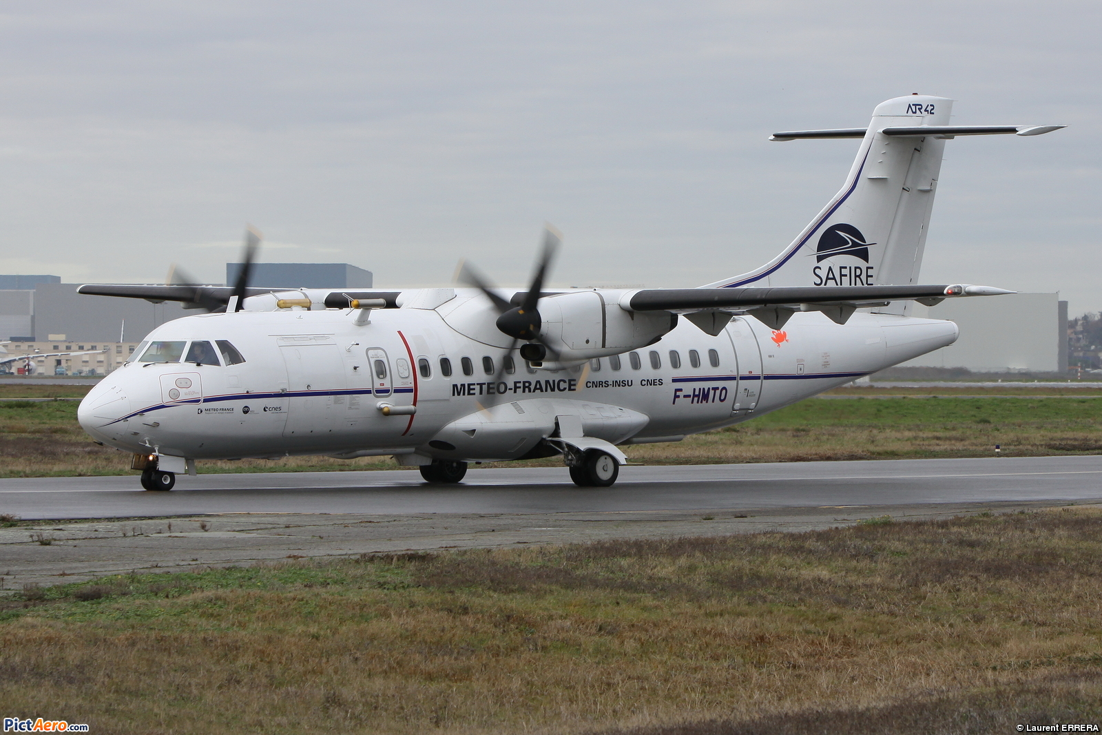 Photo prise à l'aéroport de Toulouse-Blagnac (LFBO) en France. Picture take at Toulouse-Blagnac Airport (LFBO) in France.